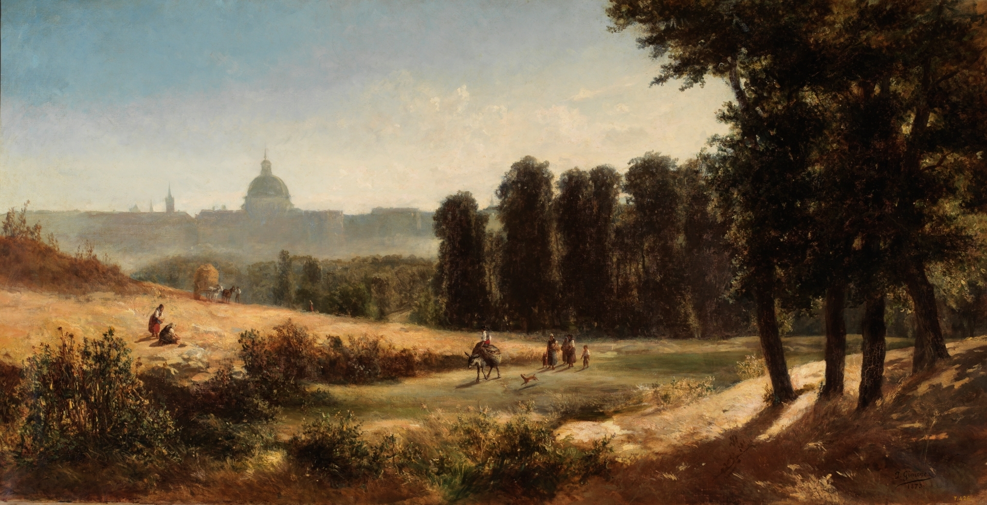 Paisaje. Arroyada de las huertas de Luche (cercanías de Madrid) (1873), de José Jiménez Fernández. Óleo sobre lienzo, 107 x 220 cm.